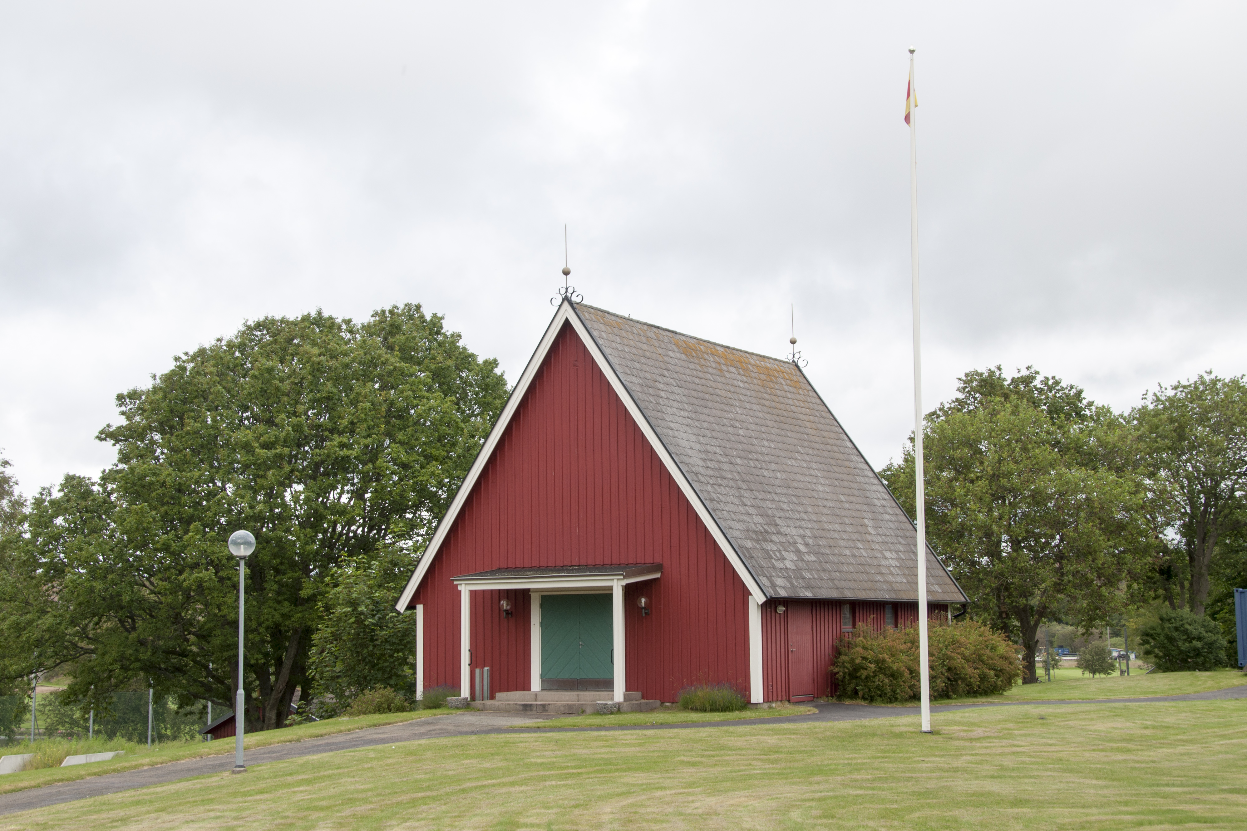 Röds kapell, Skaftö, Nybyggnadsår 1967, Carl Norman (Arkitekt)